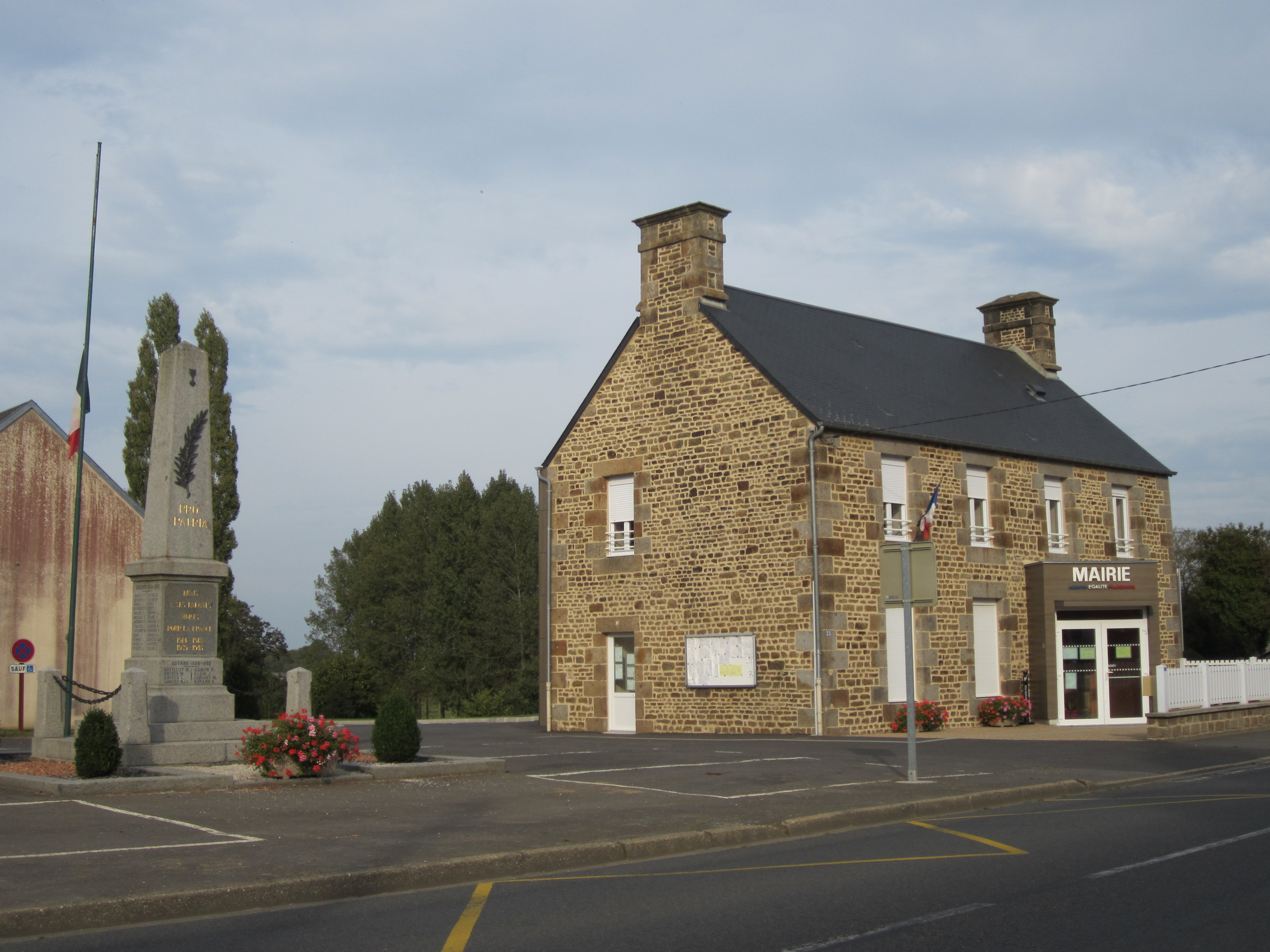 Buais, Manche